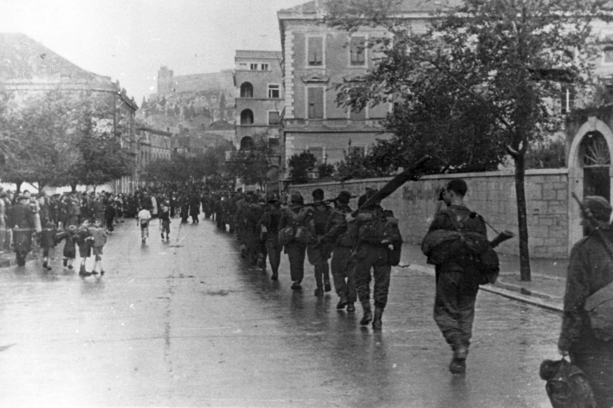 La Prima brigata proletaria dalmata entra a Sebenico nel novembre 1944